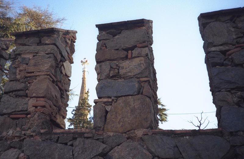 la toure de Bellesguard vue depuis les crénaux Photographer Isabelle Grosjean ZA Date 1995-03 License GNU FDL Camera Minolta Dynax 500si